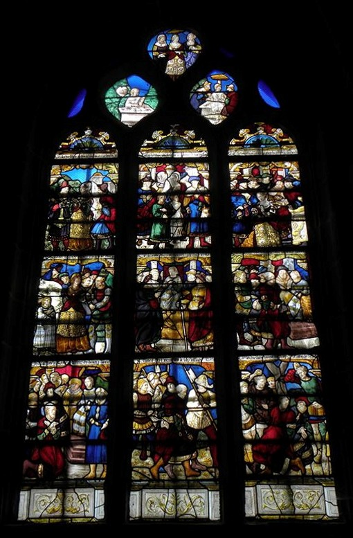 Baie 4 de l'église Saint-Ouen aux Iffs (35).